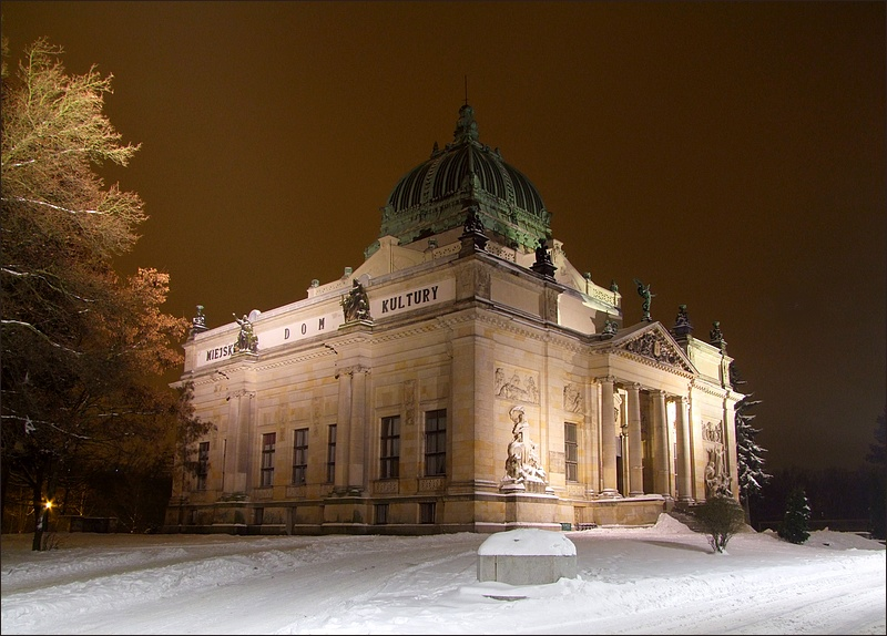 Zgorzelec, Miejski Dom Kultury, Parkowa 1, 1898-1902, nr rej.: 1139/J z 14.05.1993